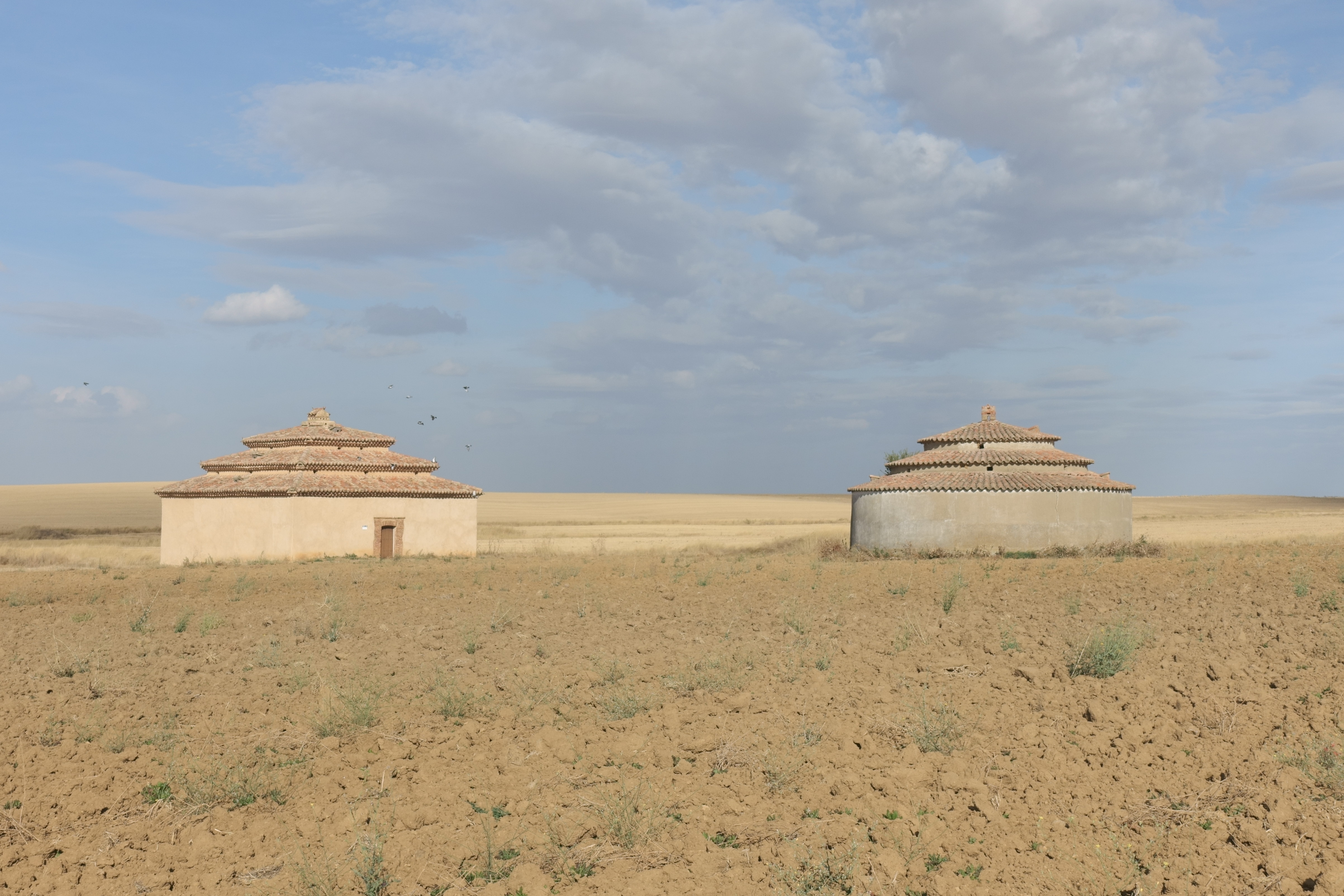 Palomares en Malva (Zamora, España).